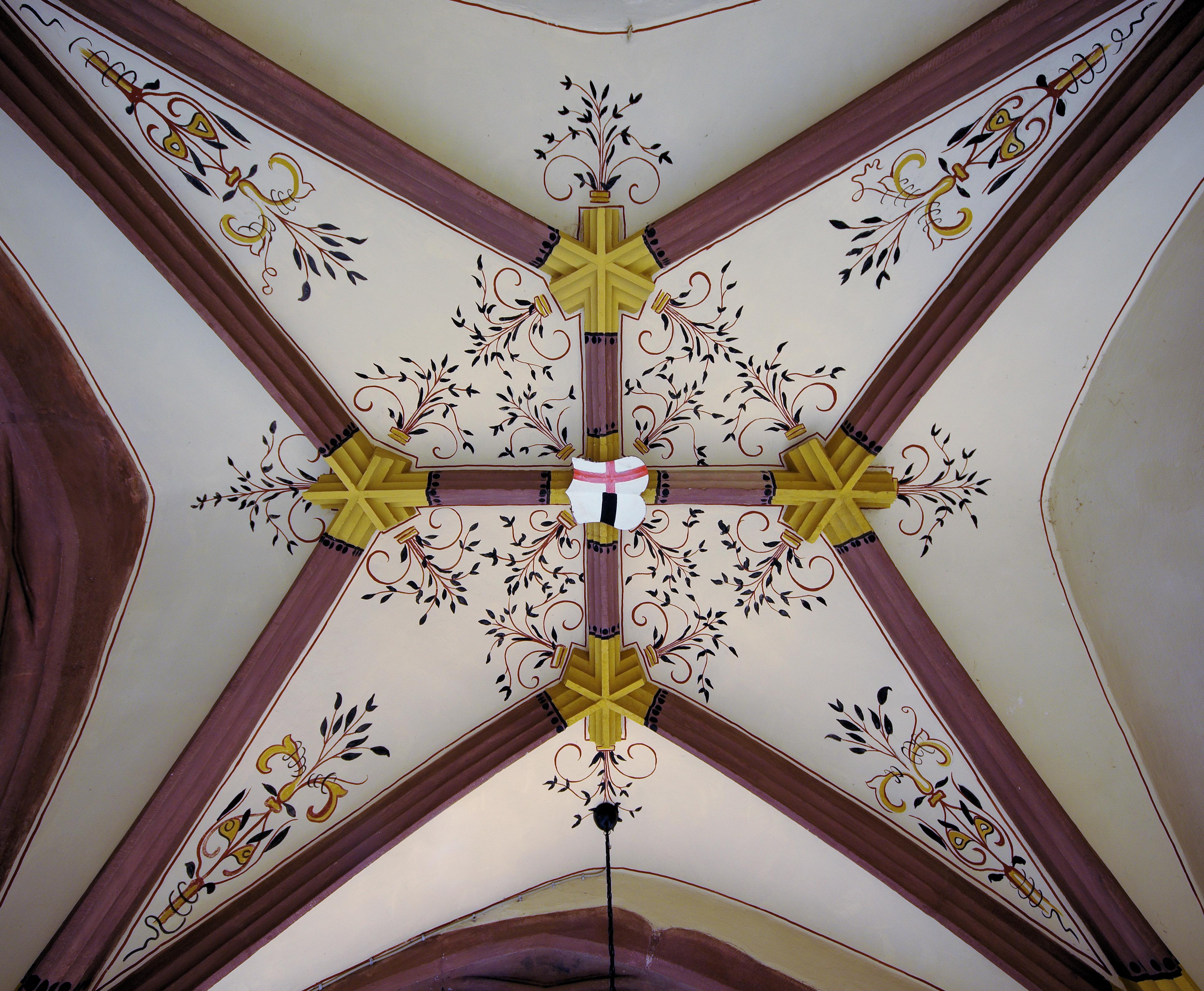 Das Gewölbe mit einem Doppelwappen von Vorderösterreich und der Stadt Freiburg auf dem Schlussstein.